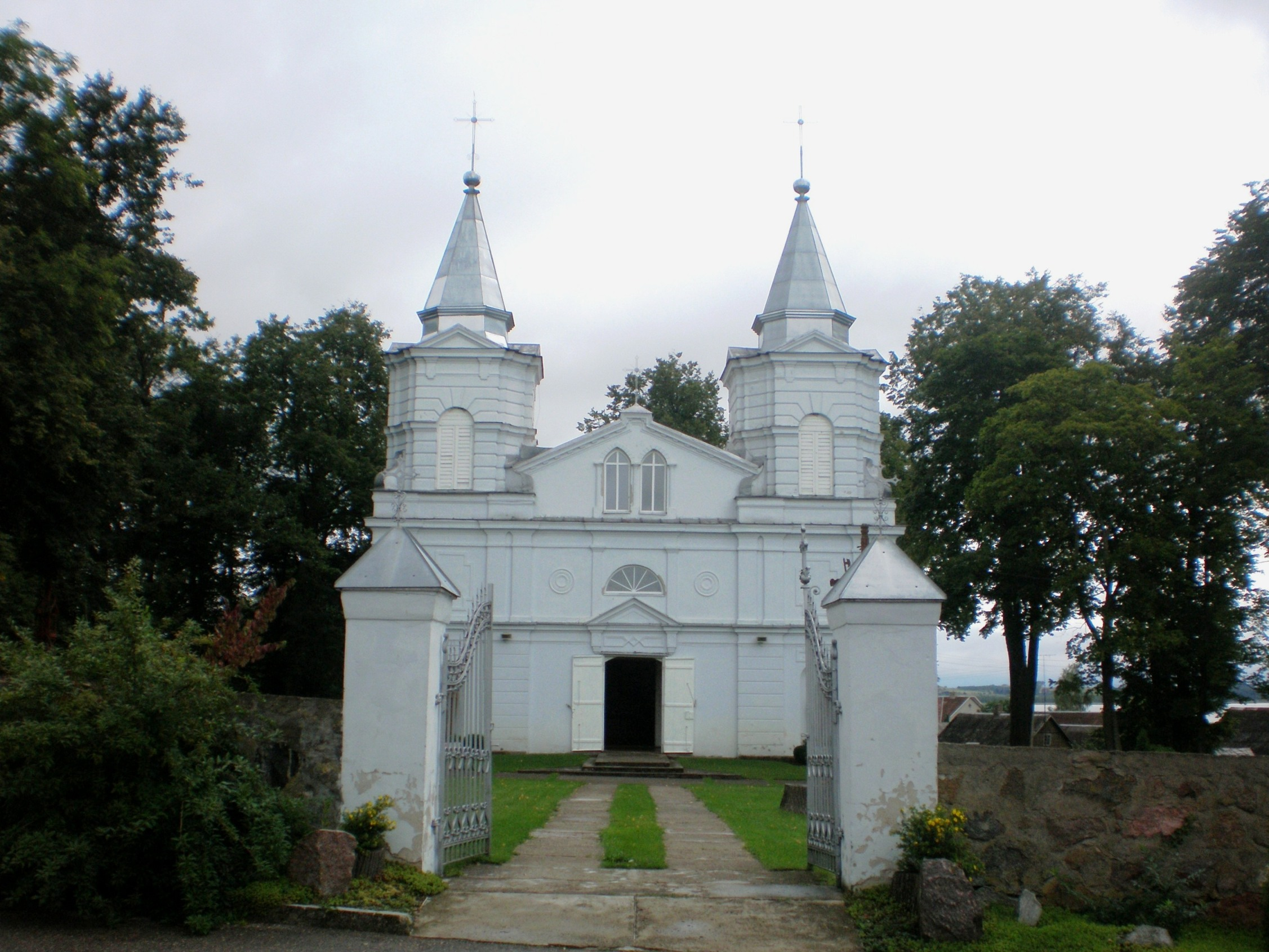 Metelių bažnyčia, Lazdijų raj.